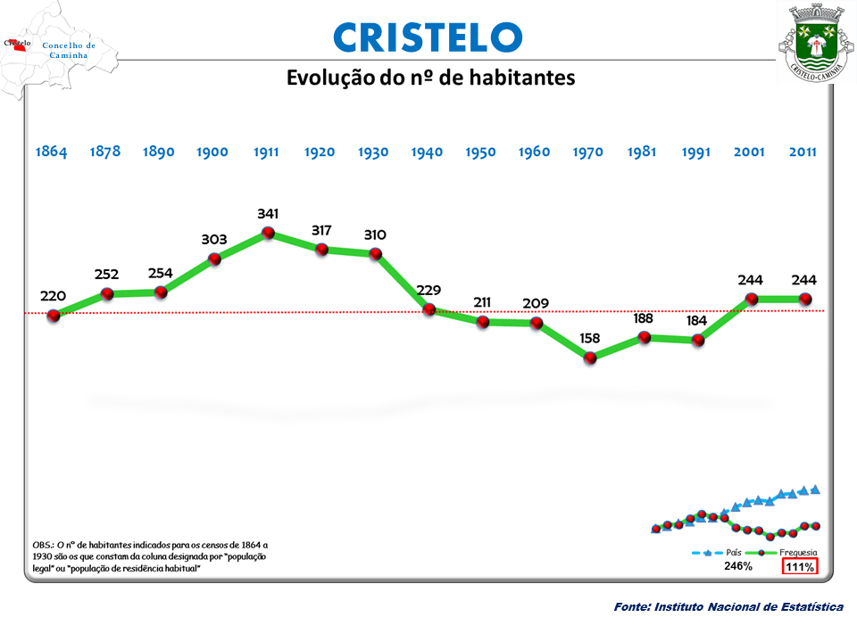 Censos 1864/2011